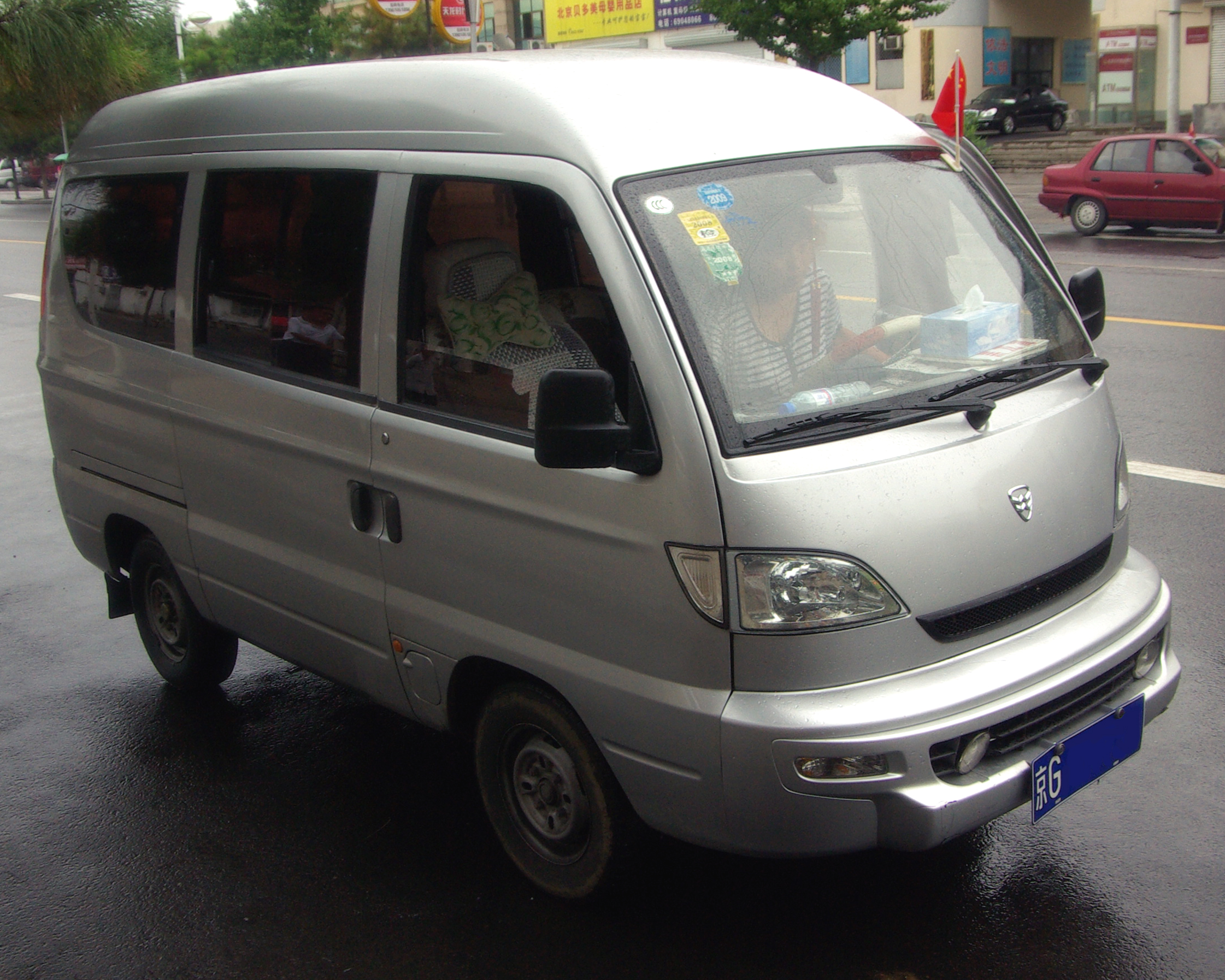 Hafei Zhongyi HFJ 6376